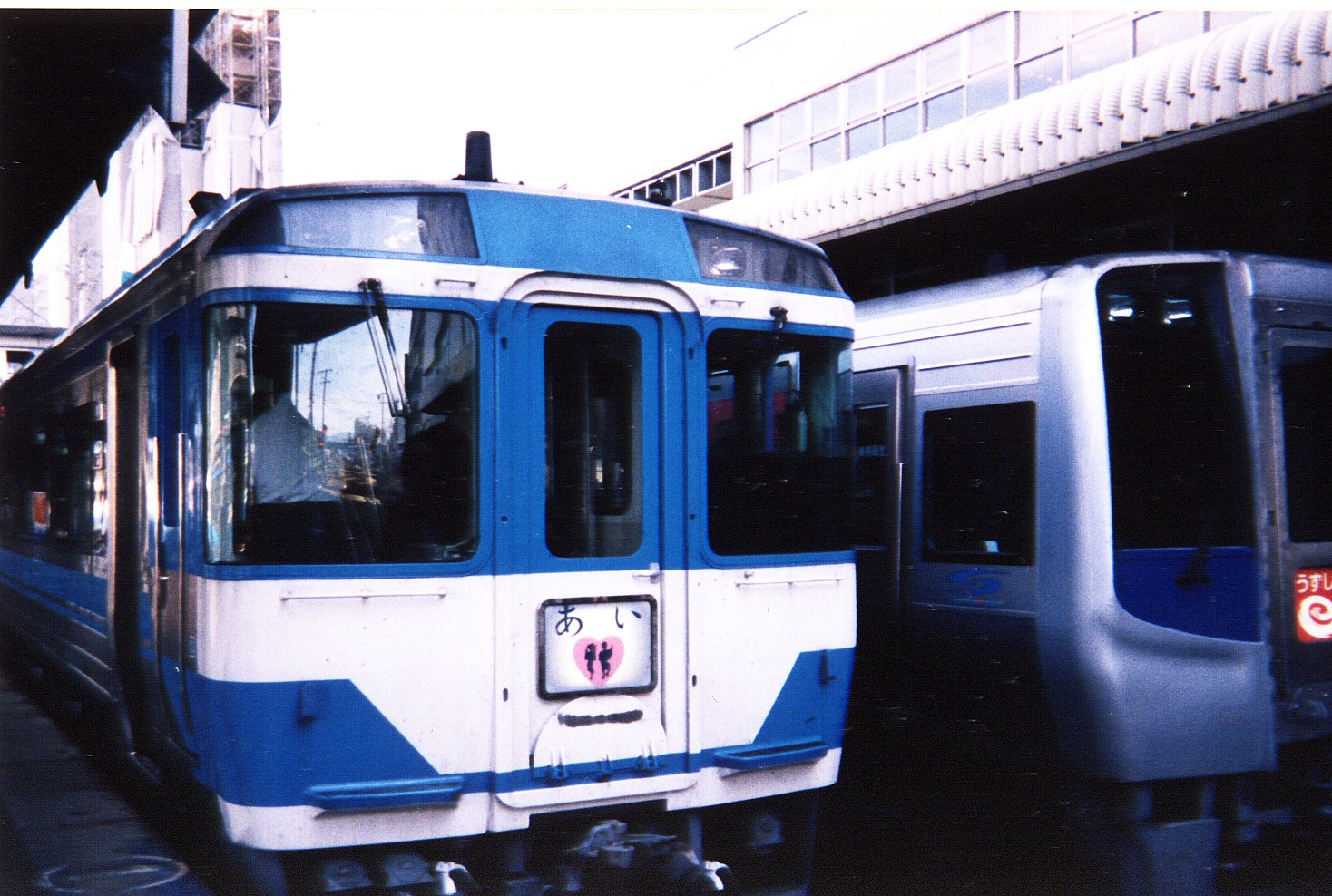 185系四国色あい